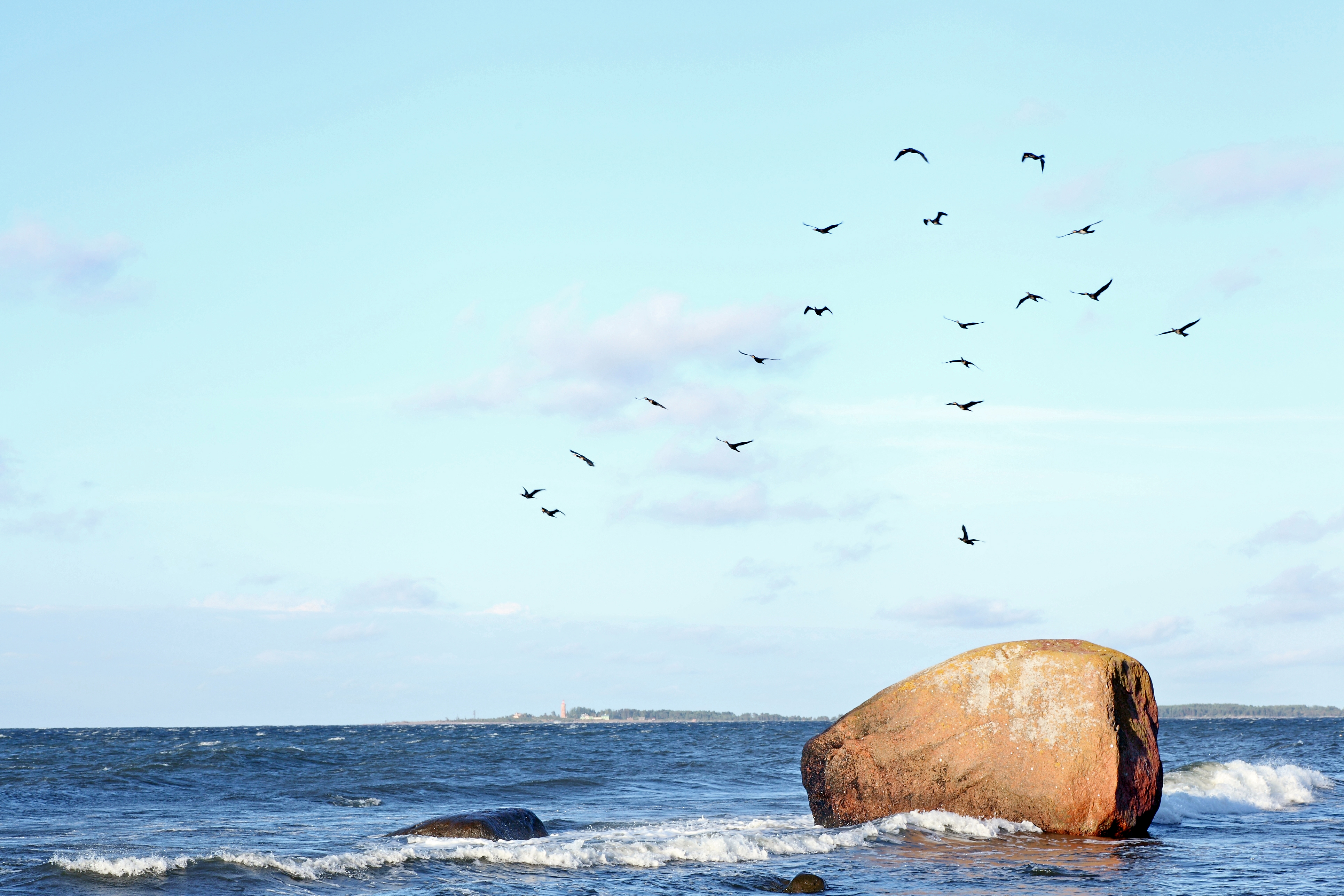 Kormoranid Mähuotsas Pärispea poolsaarel, taamal Mohni saar.